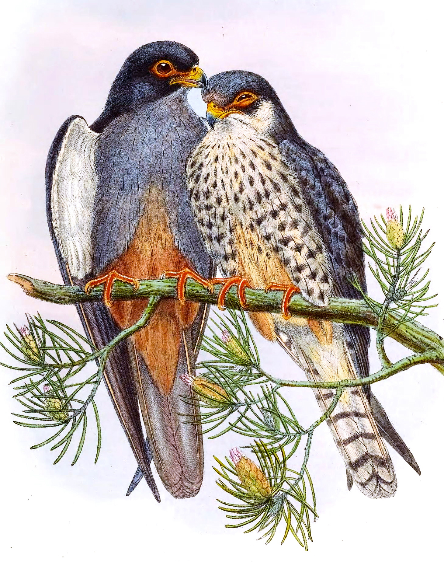 Falco amurensis